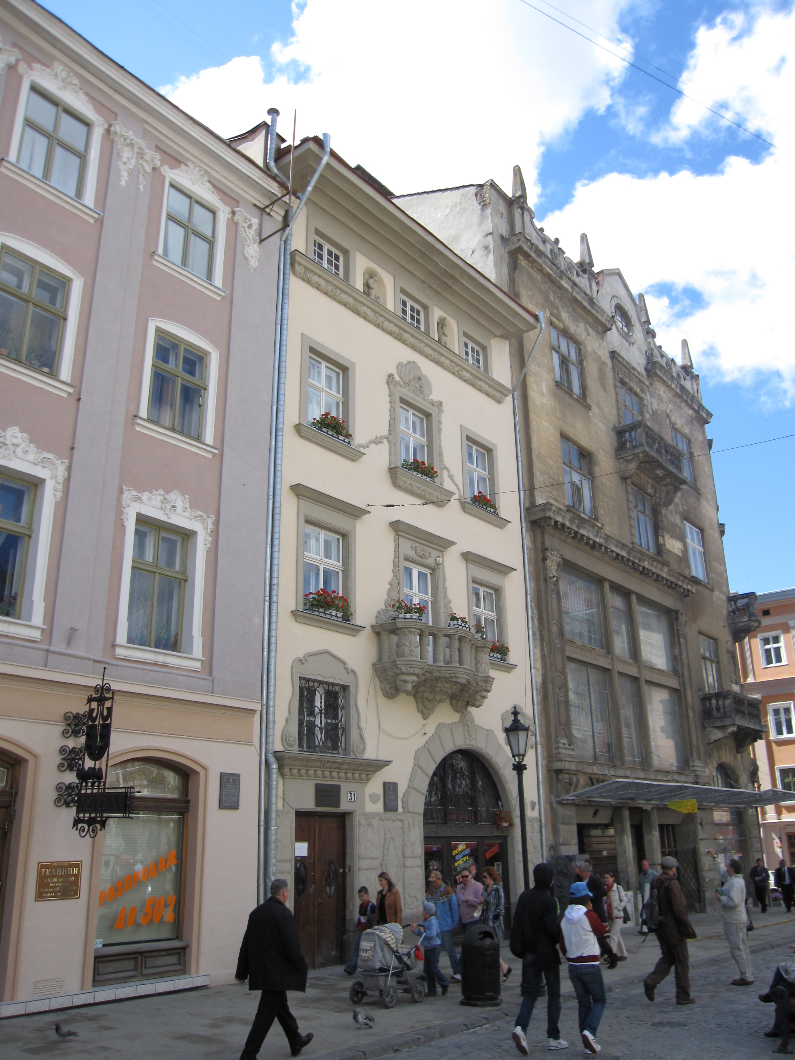 Rynek of Lwow